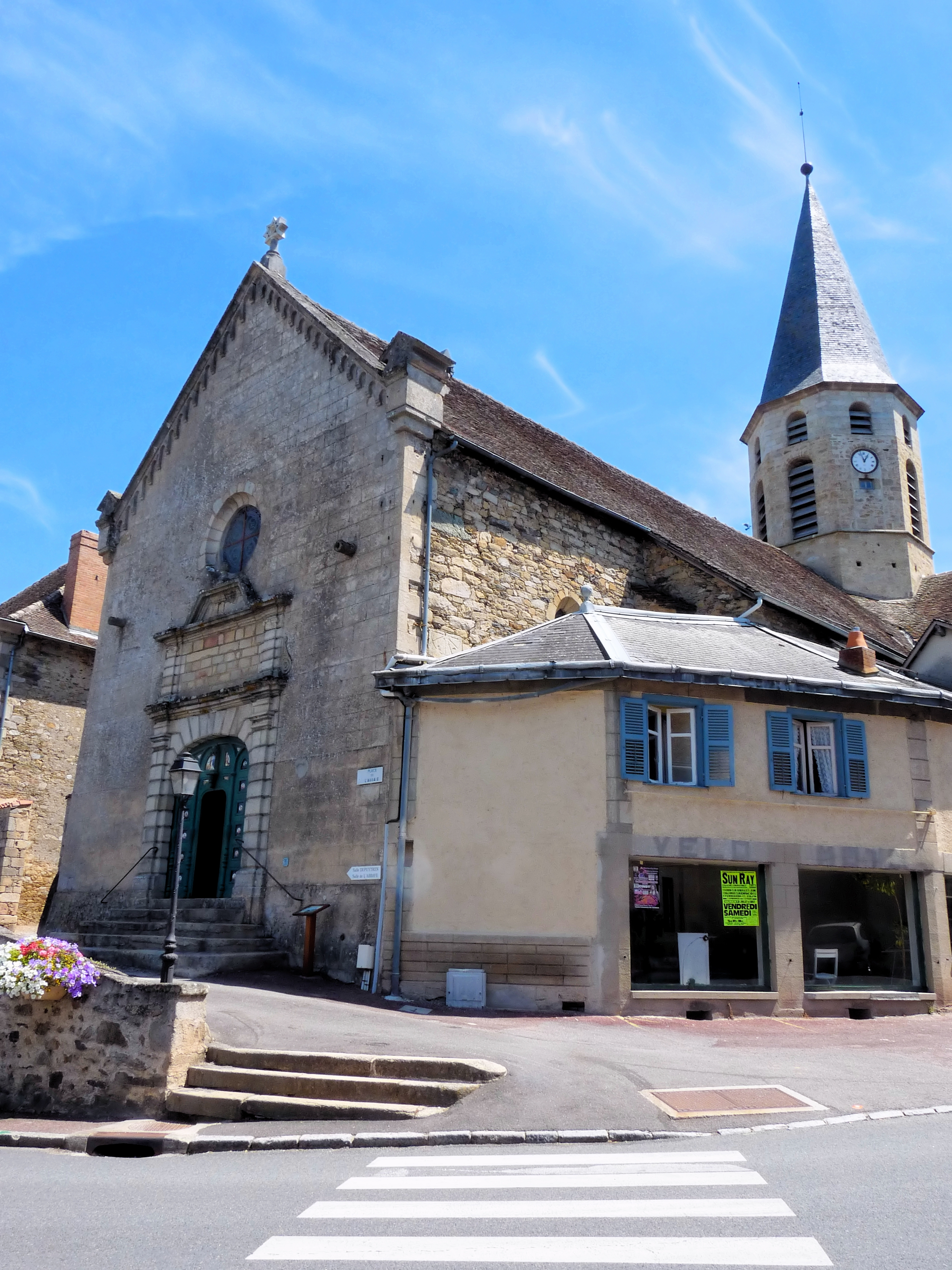 Église Sainte-Croix-Saint-Côme-et-Saint-Damien de Pierre-Buffière, (Inscrit, 1985) .